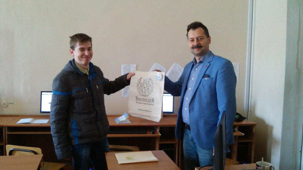 Вручення подарунку університетського конкурсу статей Вікіпедії за 2016-17 навчальний рік. Ніжинський державний університет імені Миколи Гоголя